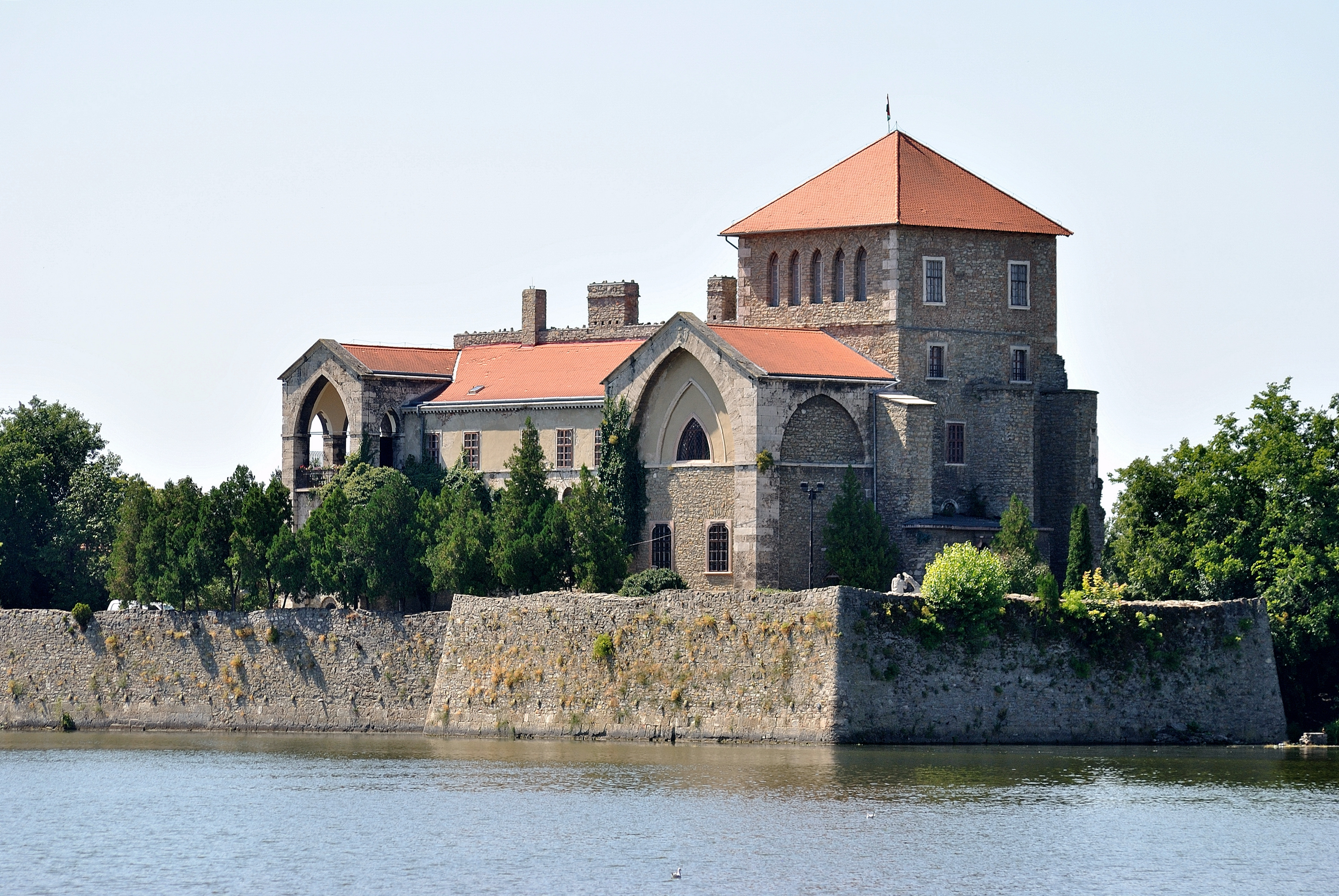 váregyüttes This is a photo of a monument in Hungary. Identifier: 6470